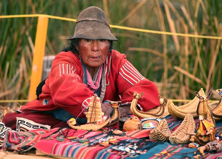 Vendedora de artesanias de la isla de Los Uros